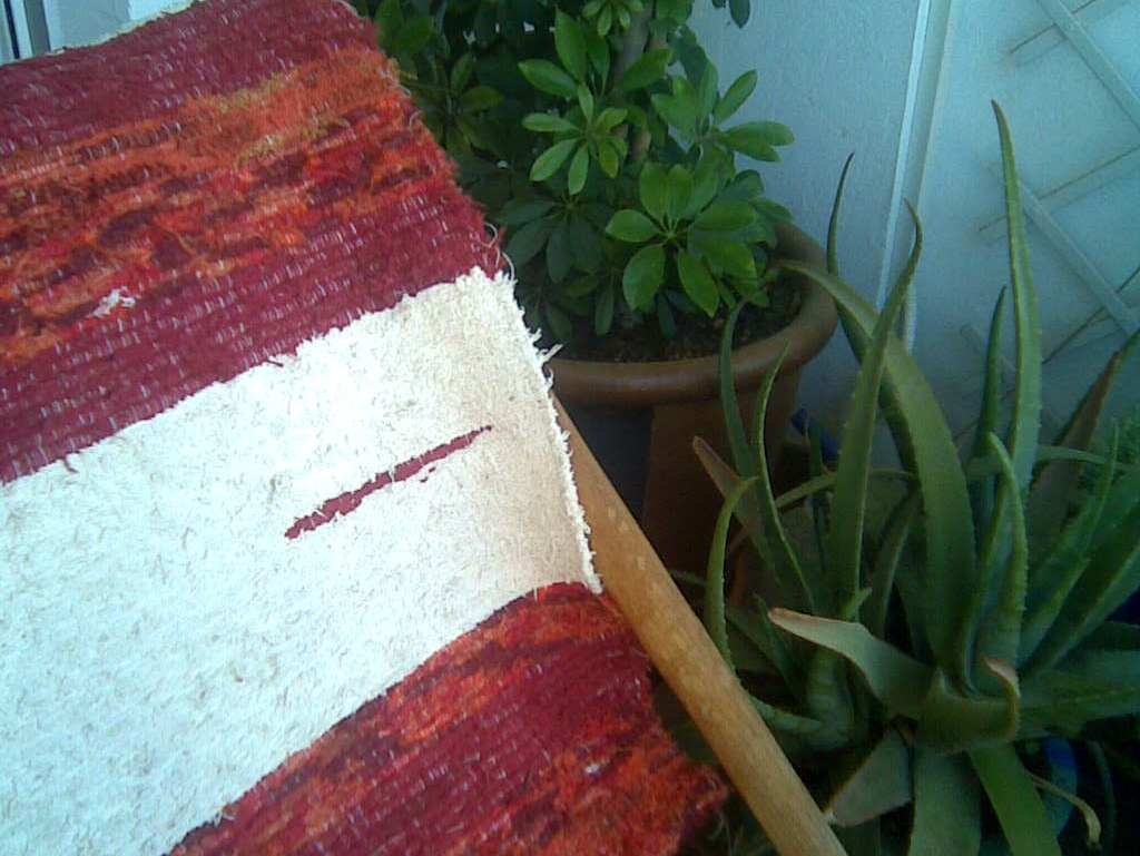 Jarapa de Níjar (Almería)